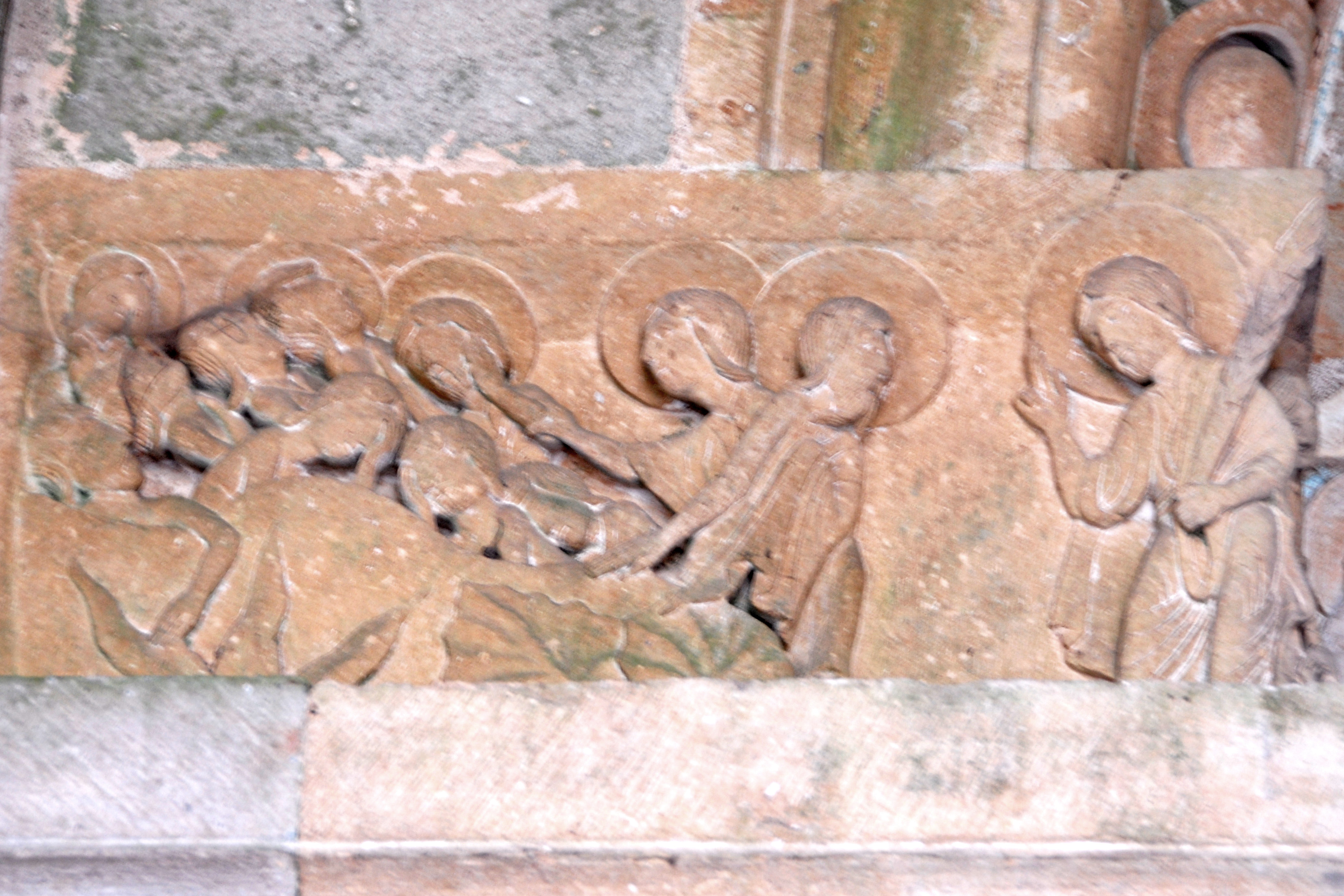 Portal, Türsturzrelief, links, Gethsemane